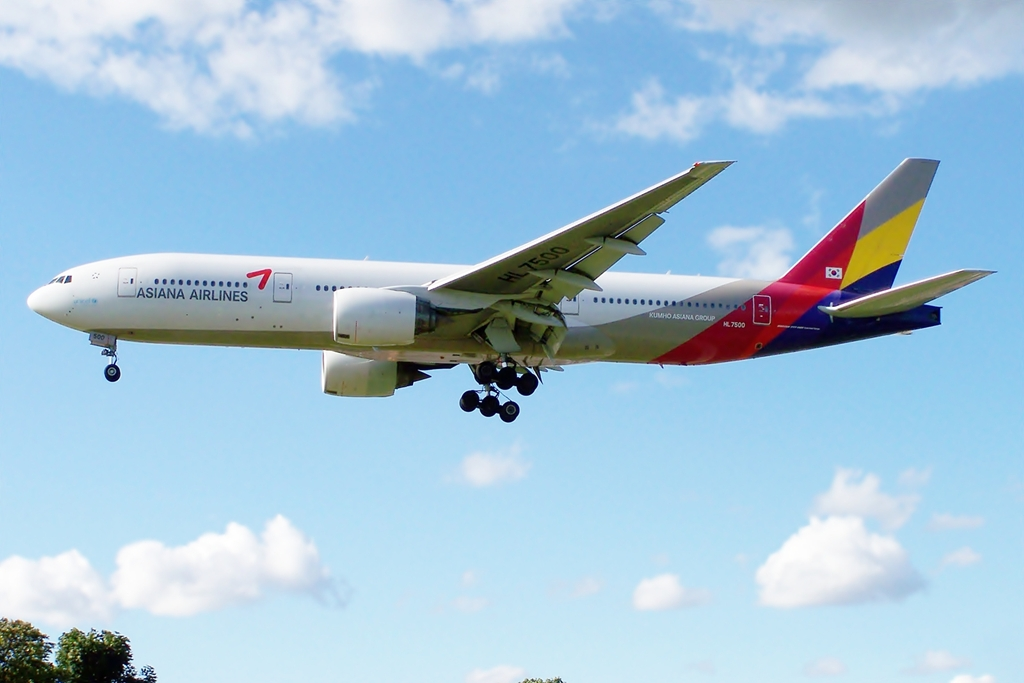 HL7500 Boeing 777 Asiana